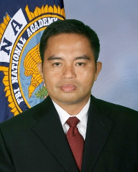 Brigjen Pol Dr Tommy Winston Watuliu